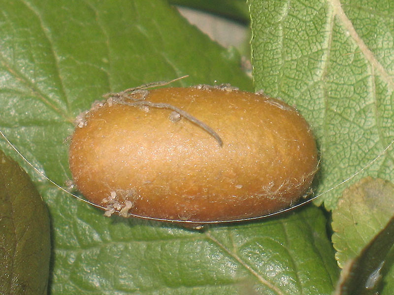 Exemplar found: Russia, Pskov Oblast, Pustoshkinsky District, near village Ivanishchevo, 07.08.2008 Псковская область, Пустошкинский р-н, окрестности деревни Иванищево, 07.08.2008